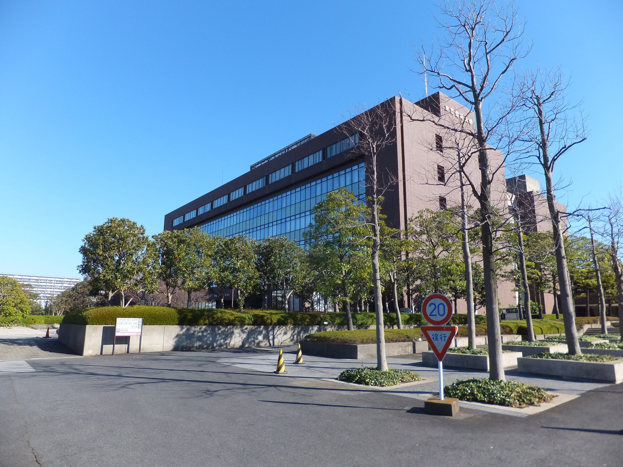 東京歯科大学 千葉校舎（千葉市美浜区）